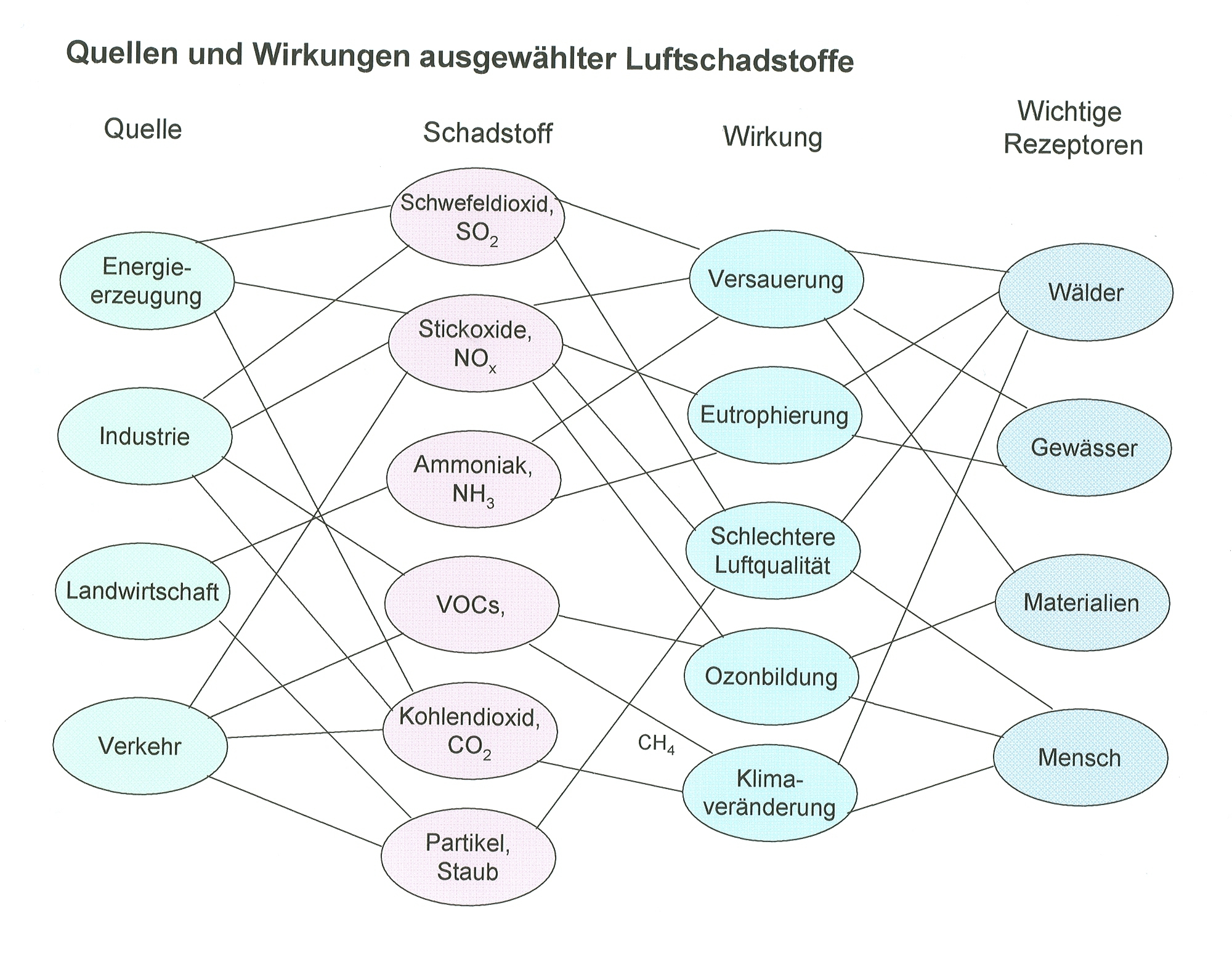 Multieffekt von Luftschadstoffen